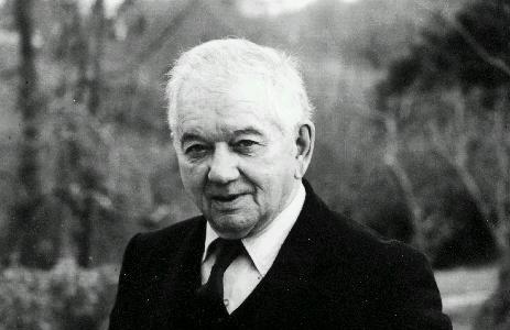 Jakez Konan nevez deuet en-dro da Vreizh e 1978.